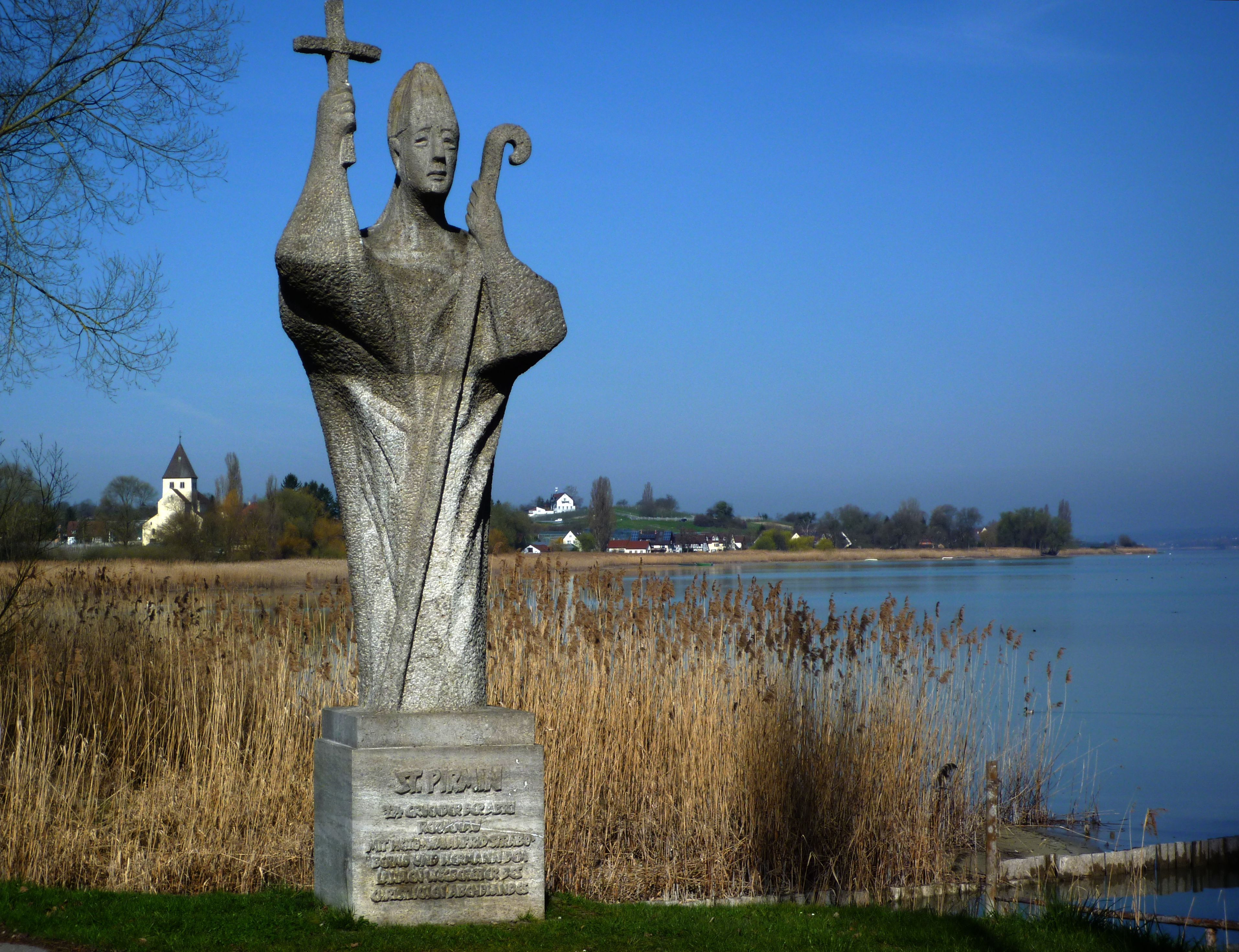 Reichenau-Pirmin-Skulptur mit Stiftskirche St. Georg, Oberzell.jpg